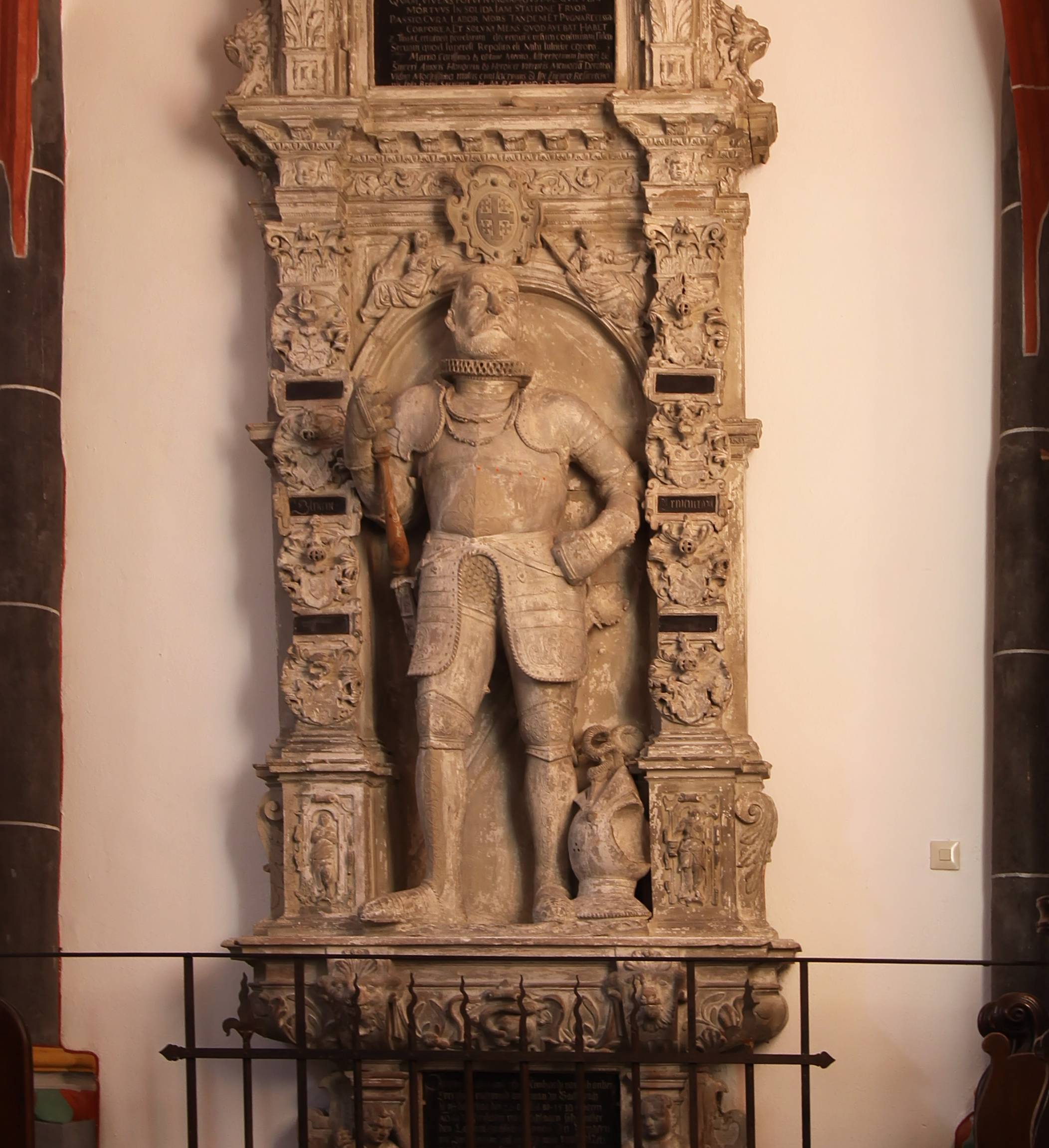 Bacharach am Rhein/Deutschland - Grabmal von Mainhard von Schönberg aus dem Jahr 1596 in der Pfarrkirche St. Peter, ausgeführt als wappengeschmückte Renaissanceädikula.